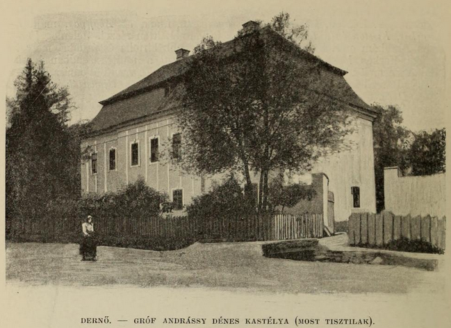 Castle in Dernő Dernő, kastély